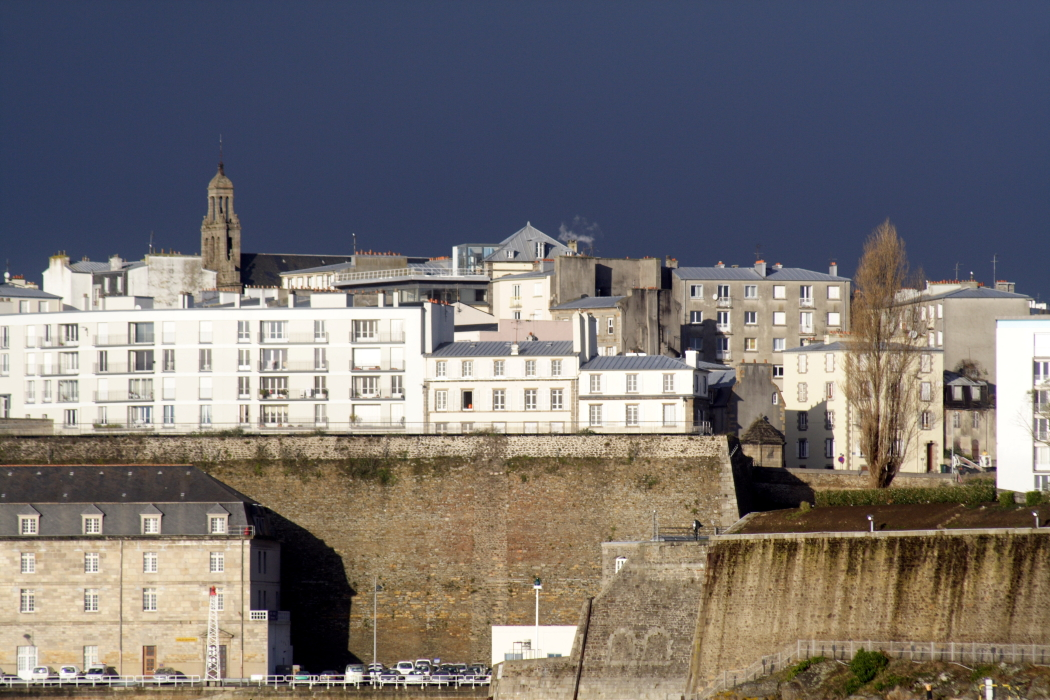 Patrimoine du Finistère Le quartier de Recouvrance vu de la nouvelle digue du Port du Château, Eglise Saint-Sauveur, Maison de la Fontaine, Batterie du Cavalier contenant le Jardin des Explorateurs et Bâtiments des Fours